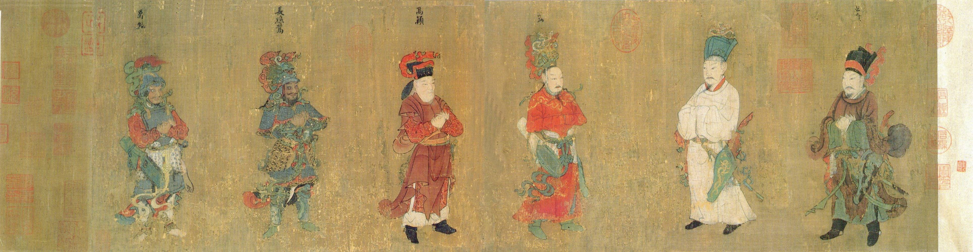 唐朝_陈闳 《八公图》 其中六個